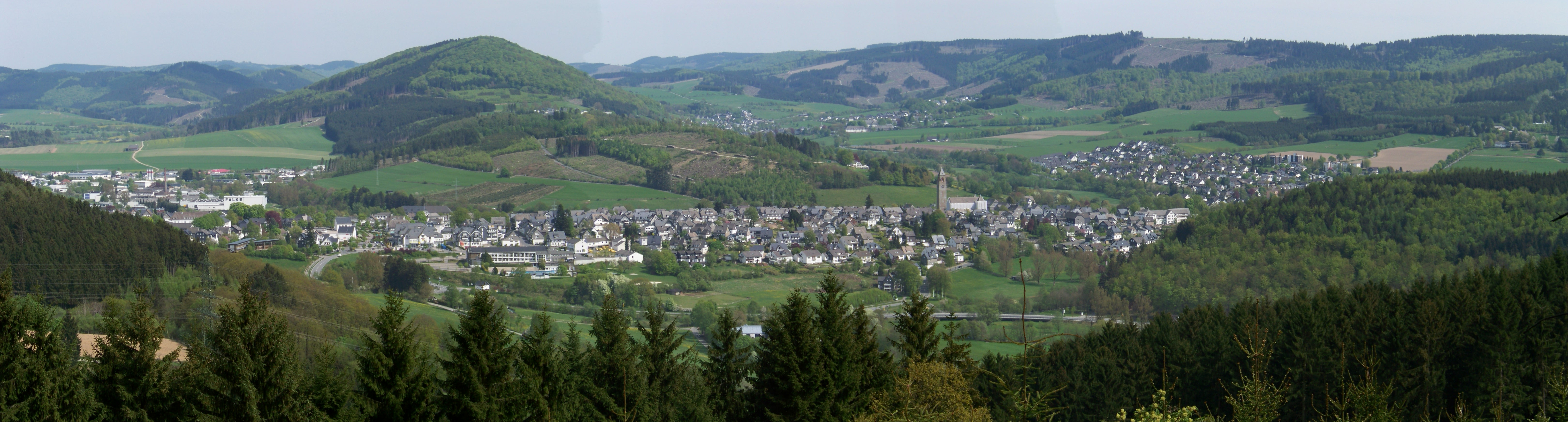 Stadt Schmallenberg, Panoramabild (Germany)